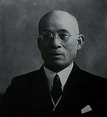 愛知県半田市の半田市立図書館で1946年から1947年に初代館長を務めた間瀬 勘作（ませ かんさく）。